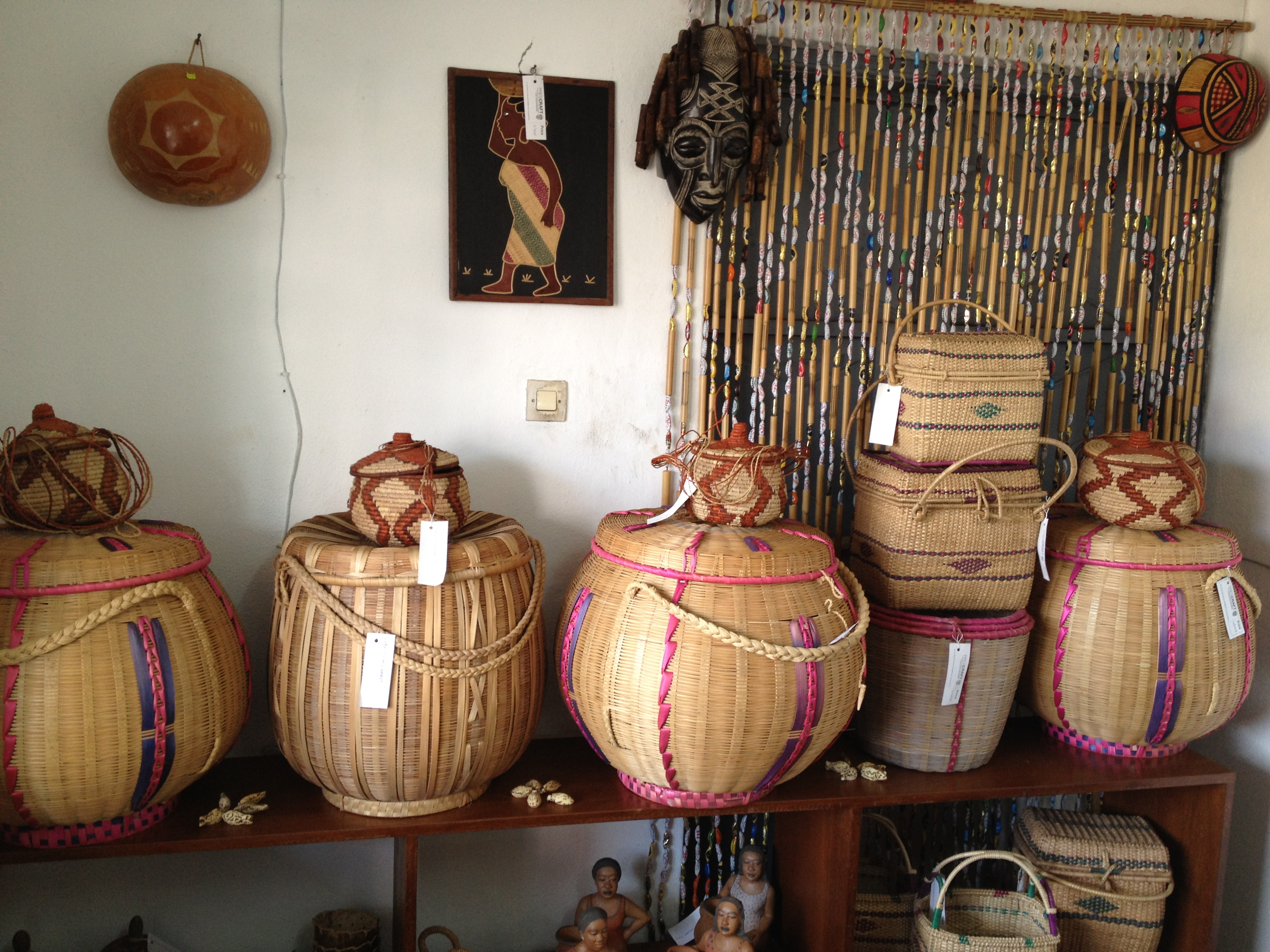 les produits de l'artisanat Camerounais This is an image of Cultural Fashion or Adornment from Cameroon